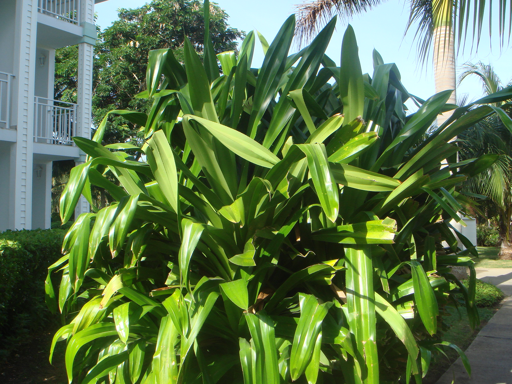 Pándano Pandanus dubius, Varadero, Cuba.